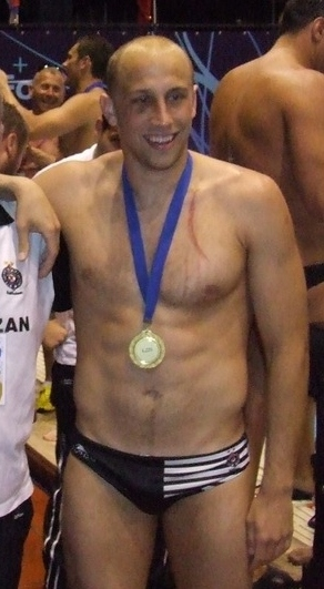 Ватерполист Партиѕана Андрија Прлаиновић после освојене титуле првака Европе.